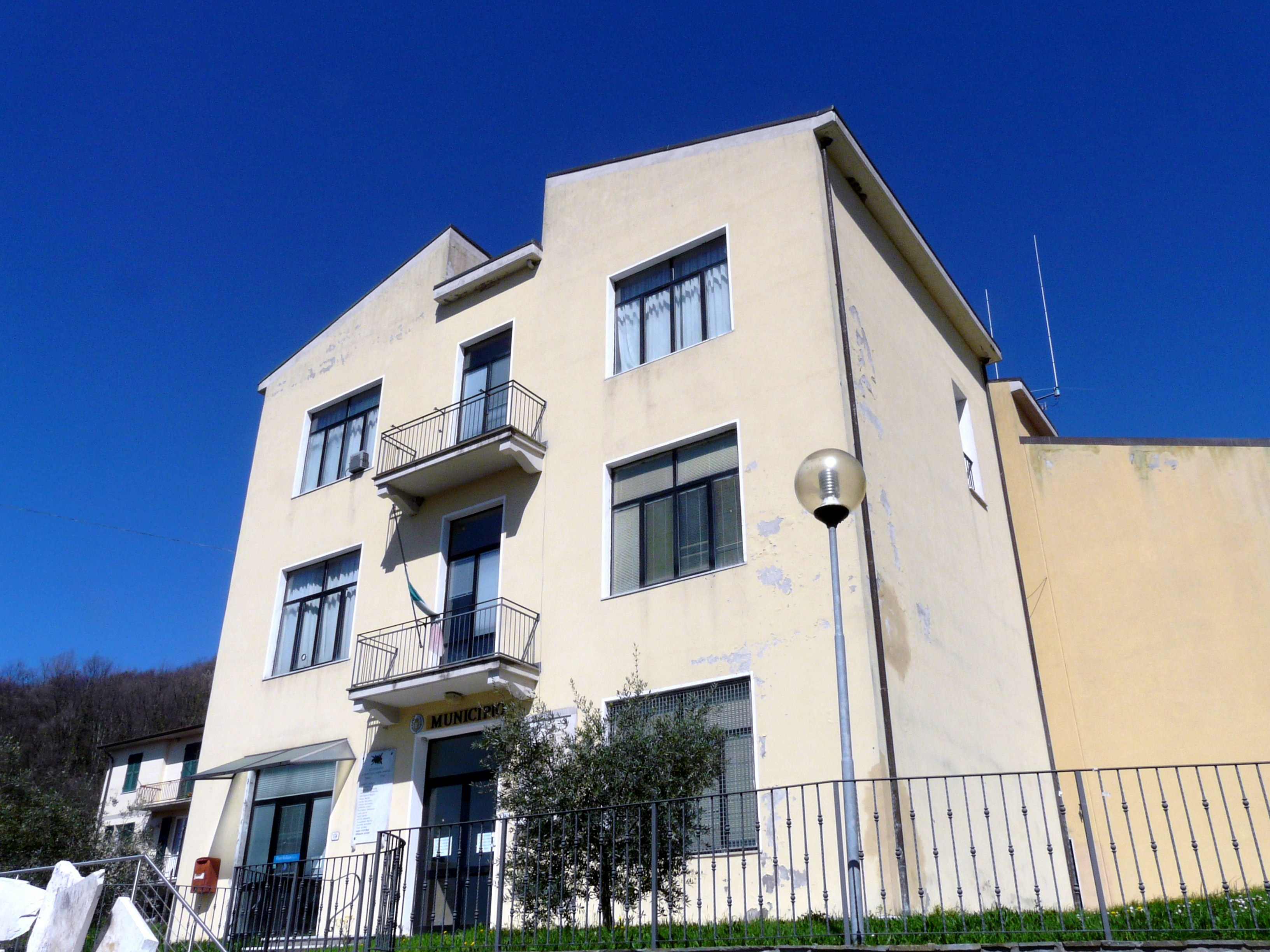 Municipio di Podenzana, Toscana, Italia